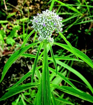 Knoxia hookeriana TRUSTED Creative Commons Attribution 3.0 (CC BY 3.0) © India Biodiversity Portal Source: India Biodiversity Portal